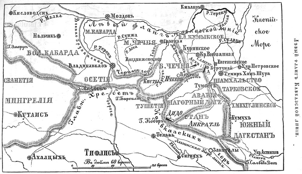 Левый фланг Кавказской линии (буквами Ч, Д и Л обозначены отряды Чеченский, Дагестанский и Лезгинский; Имя аула Гумбет по ошибке гравера (г. Рихау) значится на карте Тумбет). Карта из статьи: Угринович К. Краткий обзор военных действий на Кавказе в минувшем 1857 году // Русский вестник. - 1858. - № 2.